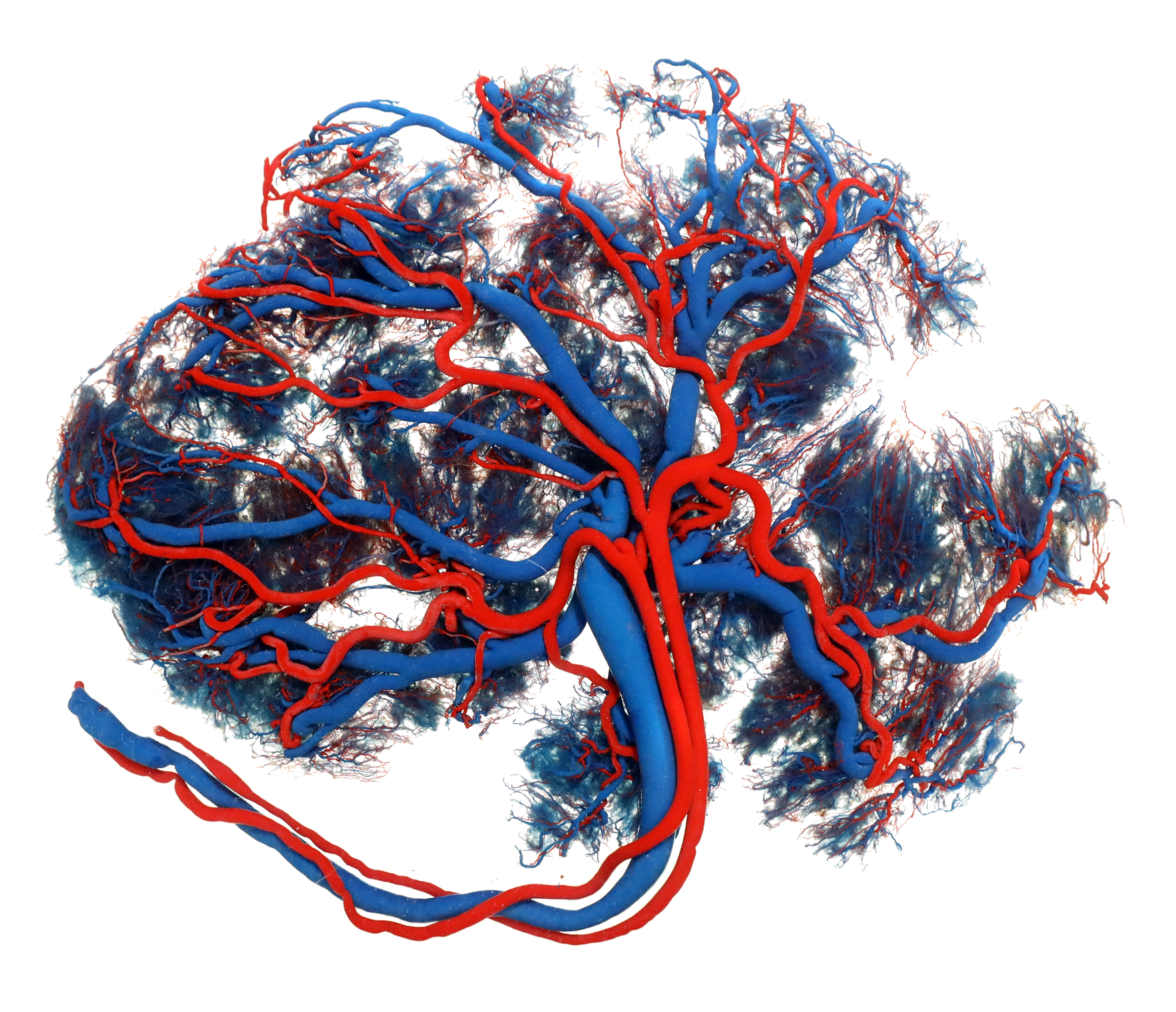 Plastinat einer Plazenta, eingefärbt - rot = zum Kind | blau = vom Kind weg - Das Plastinat wurde selbst in Auftrag gegeben. Rechte an Bild und Plastinat selbst liegen vor.